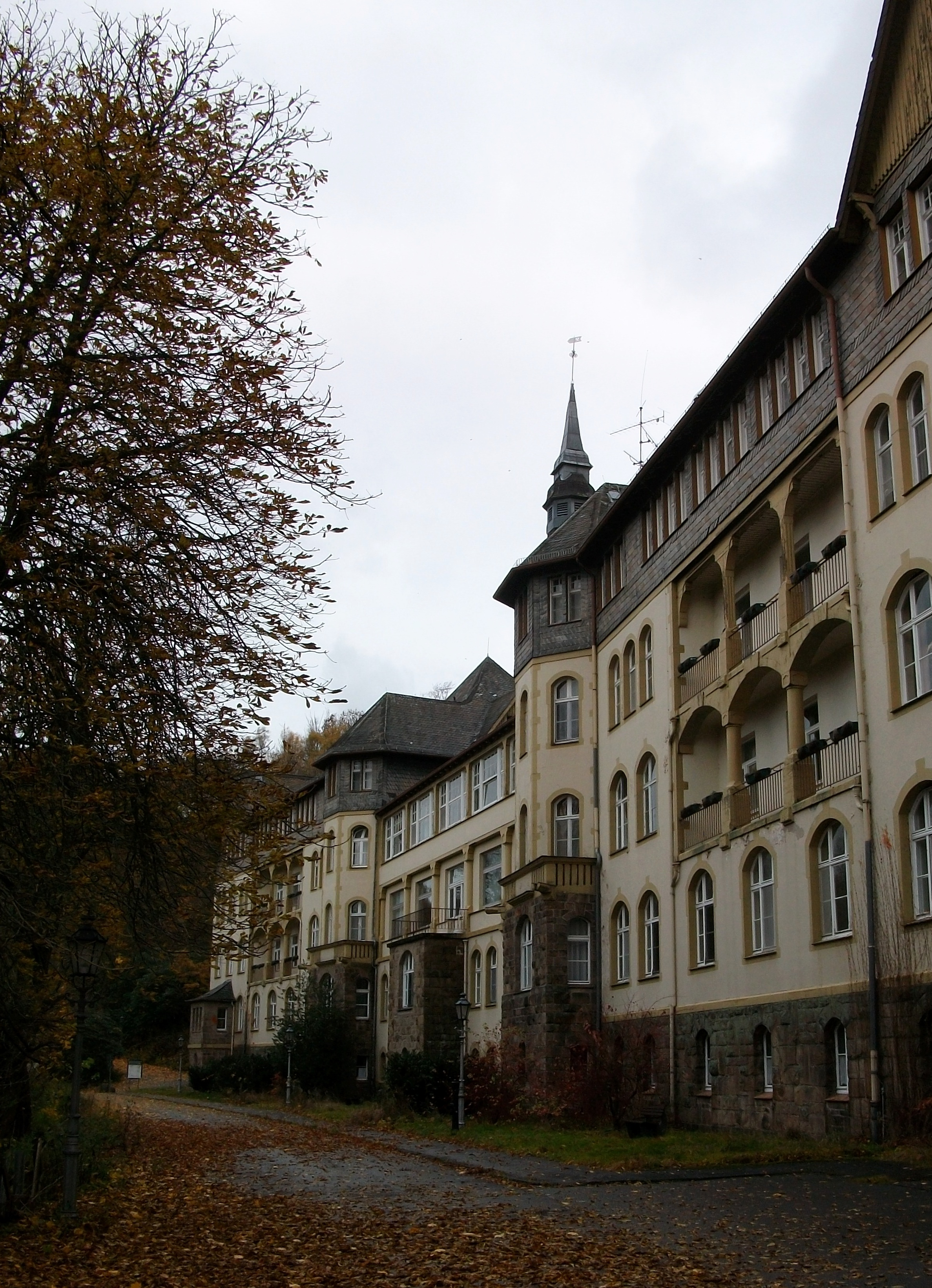 ehemalige Veramed-Klinik (Knappschaftskrankenhaus) in Meschede-Beringhausen (Germany)